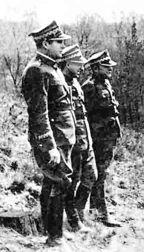 Generałowie Ludowego Wojska Polskiego Michał Rola-Żymierski, Marian Spychalski, Karol Świerczewski stojący nad Nysą Łużycką w 1945 r.